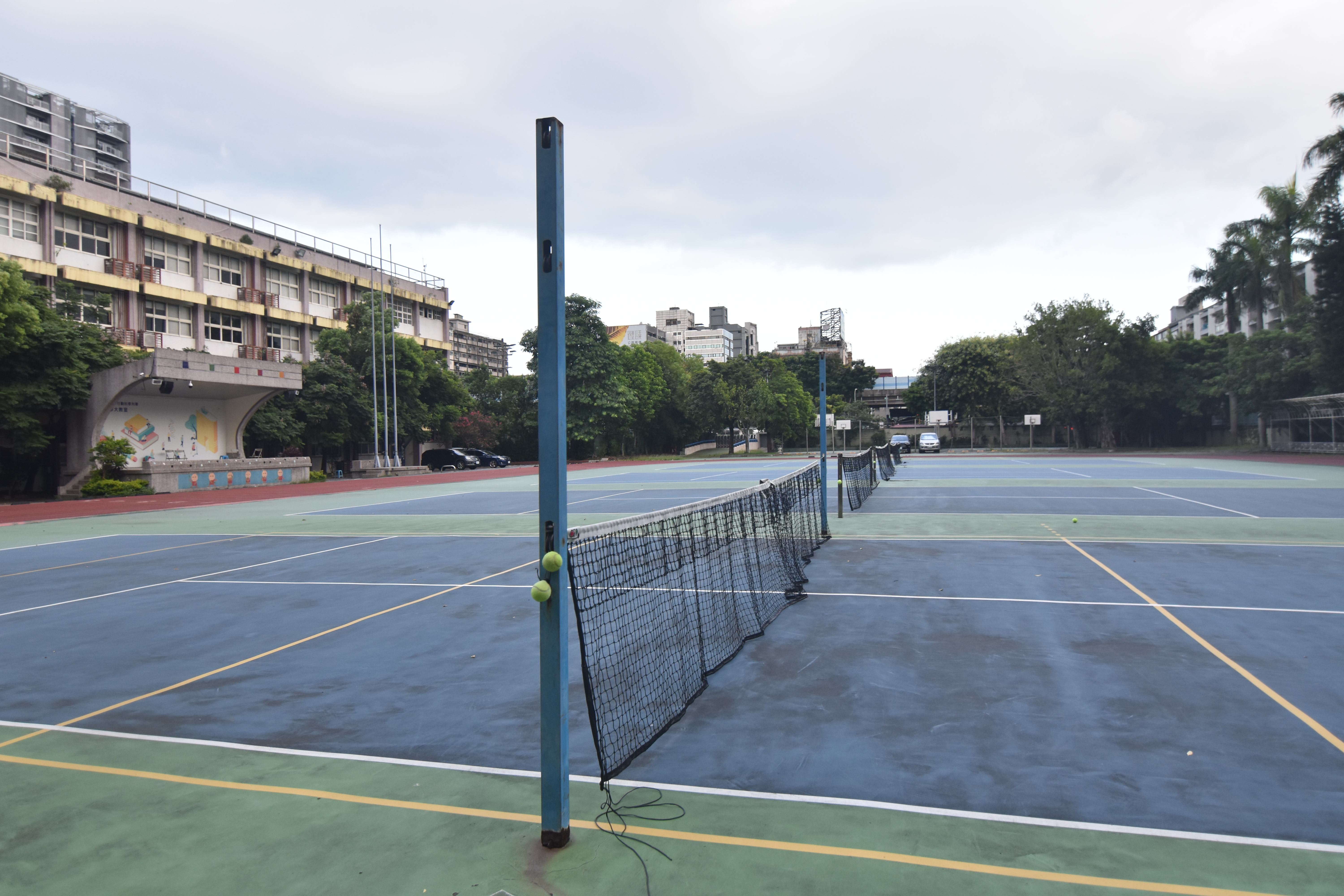 中文（台灣）: 新興國中成立於1968年，校址臺北市 中山區林森北路511號，是大家耳熟能詳，香火鼎盛的行天宮舊址，在這充滿上天庇蔭，與祝福的校地，建立起一所優質又宏偉的校園，在歷任校長與教職員的努力下，新興國中漸成一所優質的學園。擁有5座鰾準的網球場等支應充分的教學。 0544128,121.5634318, 臺北市新興國中北市中 山區林森北路511號座標25.0544128,121.5634318